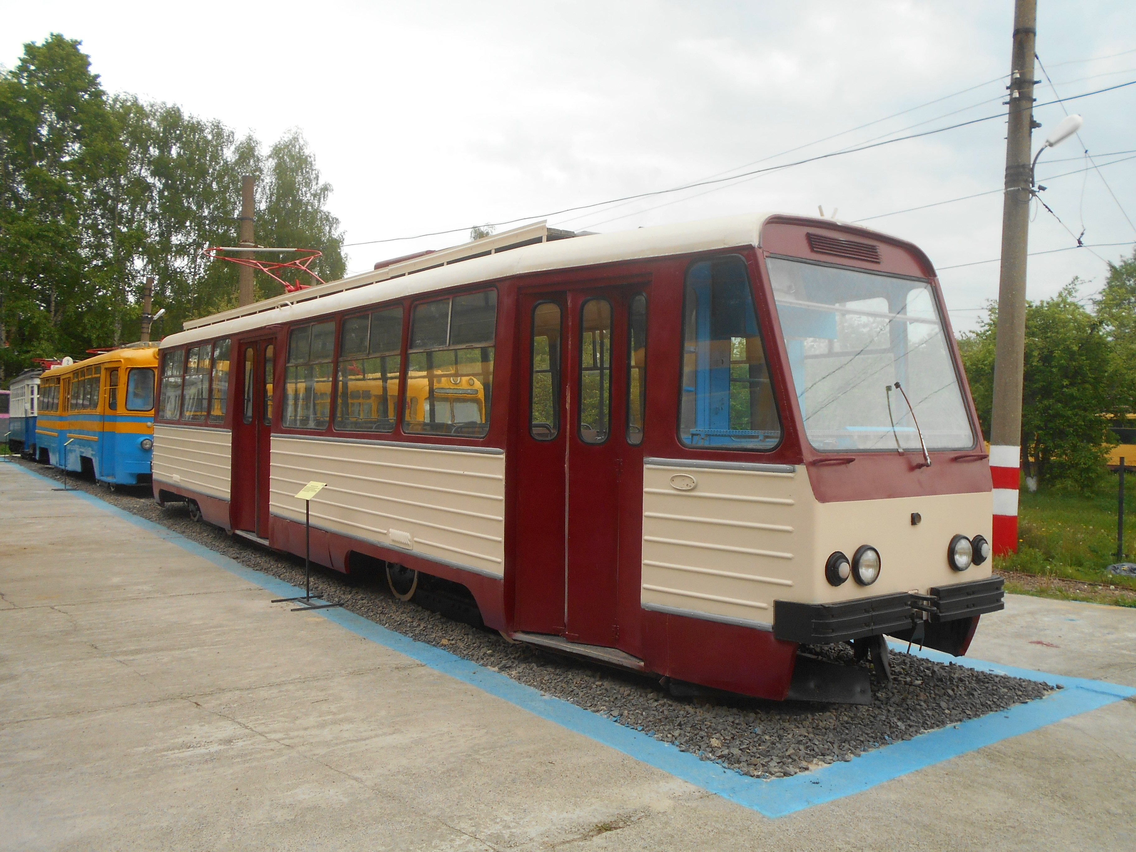 Музейный трамвай РВЗ-7 №в Нижнем Новгороде